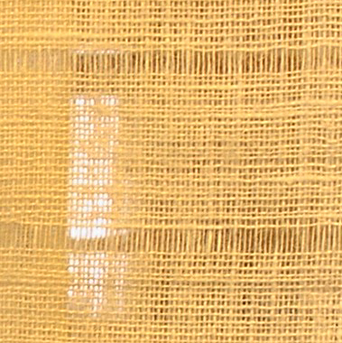 Gardin detalj av glest inslag. För att åstadkomma ett mönster med olika täthet i inslagen, enligt bilden, är det lämpligt att lägga in något som kan dras ur väven omgående. Här har använts tunna plastband som används som emballageband för kartonger. Bandet dras ur väven efter några inslag. Men det blir ändå en "glidning" av det inslag som skett efter det glesa partiet. Jämför "glidningarna" som sker vid glesa partier i varpen: Glesa partier i varptrådarna